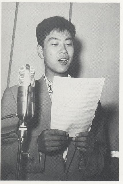 1957年に撮影されたスナップをスキャニング